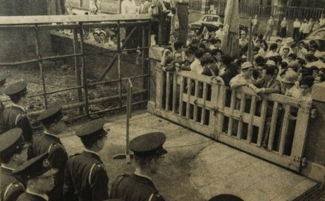 三鷹事件上告審にて、最高裁へ詰めかける裁判支援者ら